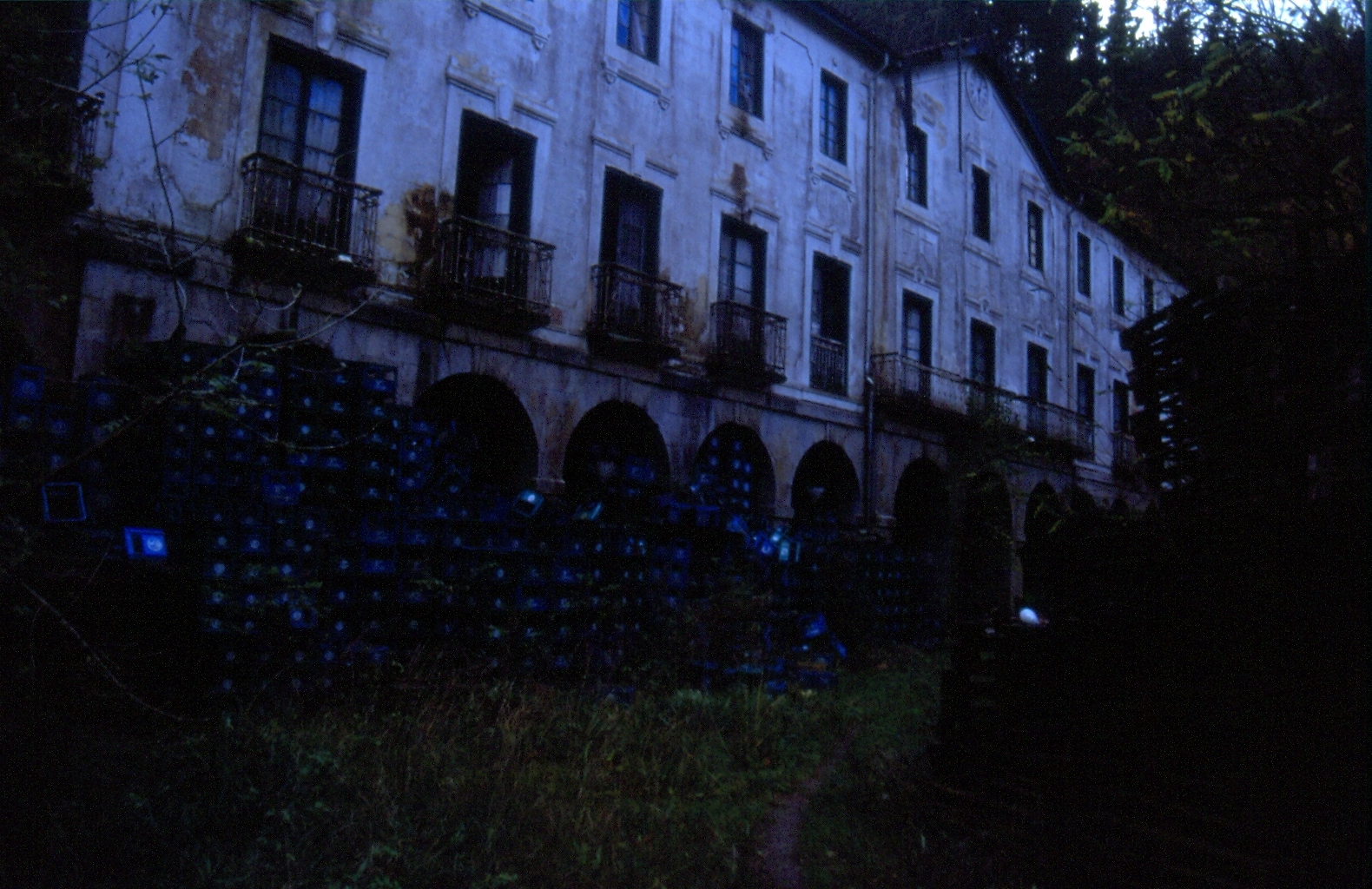 Urberuagako bainuetxearen eraikin nagusia, 2000 urtean.